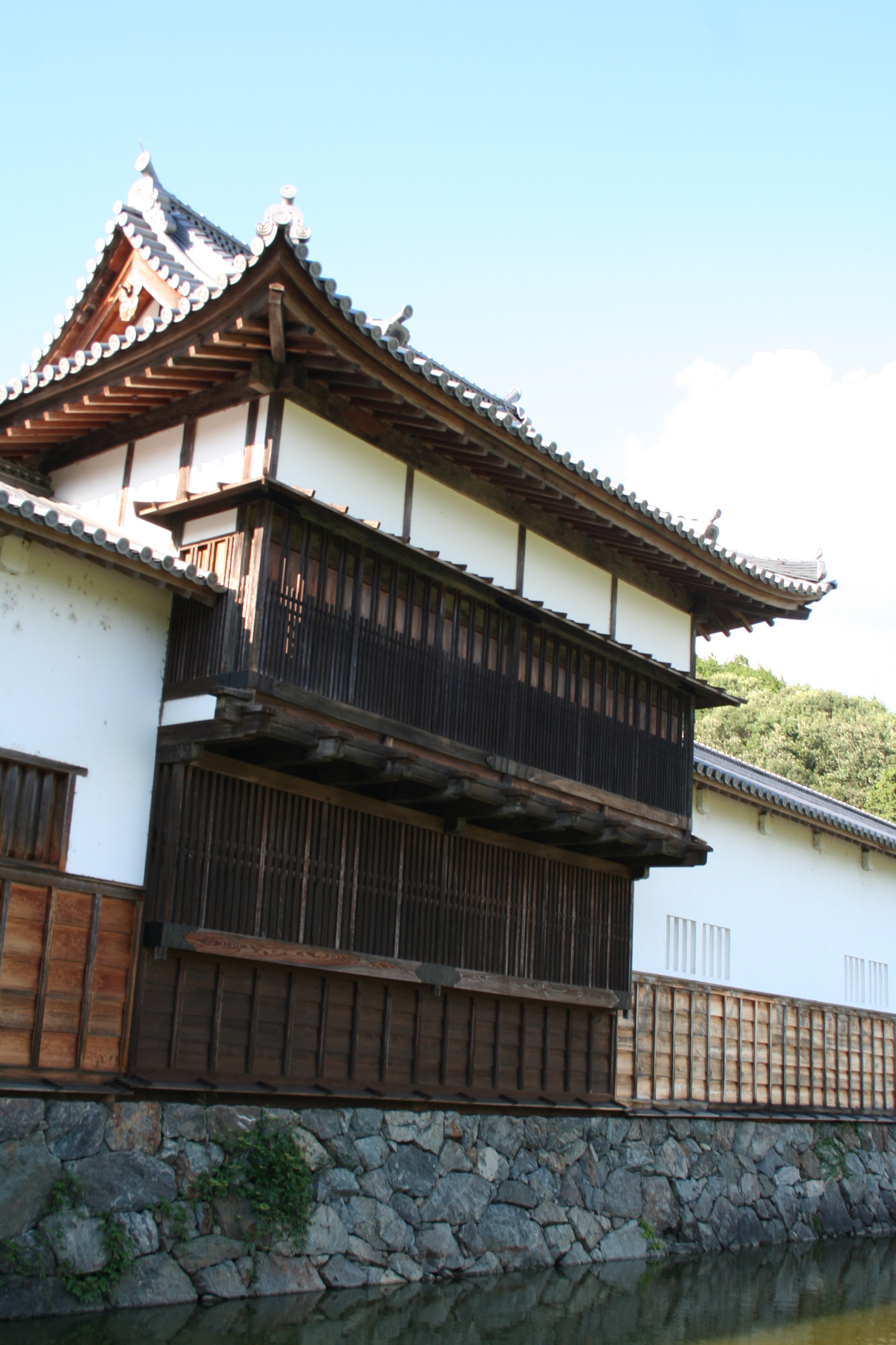 三日月陣屋。兵庫県佐用町三日月にある陣屋。 物見櫓。江戸時代には「御物見」と呼ばれここで宴などが行なわれていた。明治時代になると陣屋は解体されたがこの櫓と長屋の一部が小学校の校舎として移設利用され、その後、公民館として使用されるなどして、2003年、再びこの地へ移設復元された。